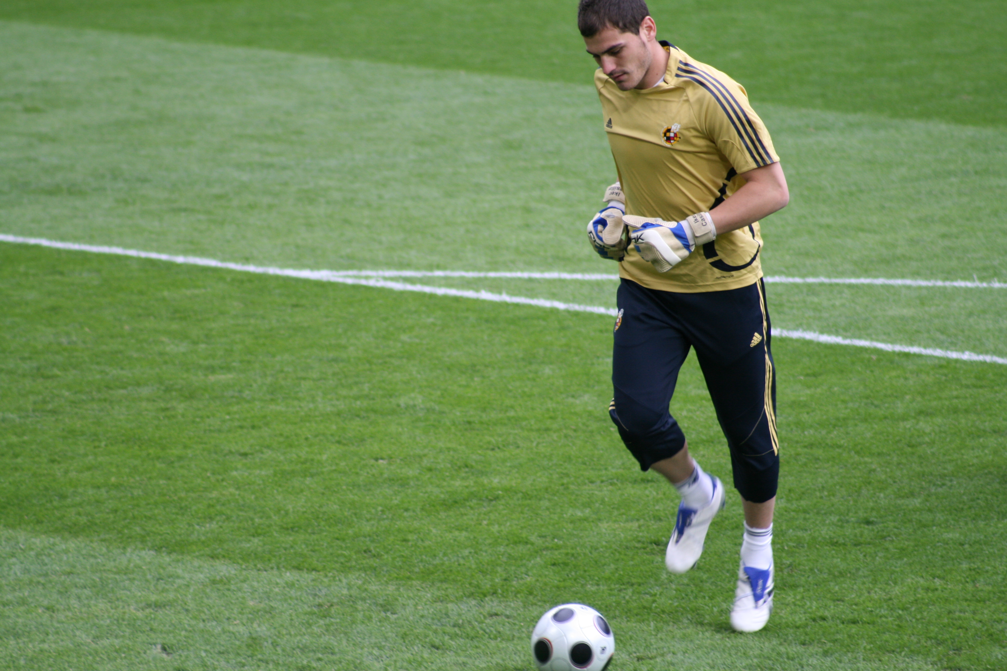 El portero de la Selección Española de fútbol Iker Casillas. Foto tomada en el partido Suecia - España de la Eurocopa 2008, en el estadio Tivoli Neu (Innsbruck)